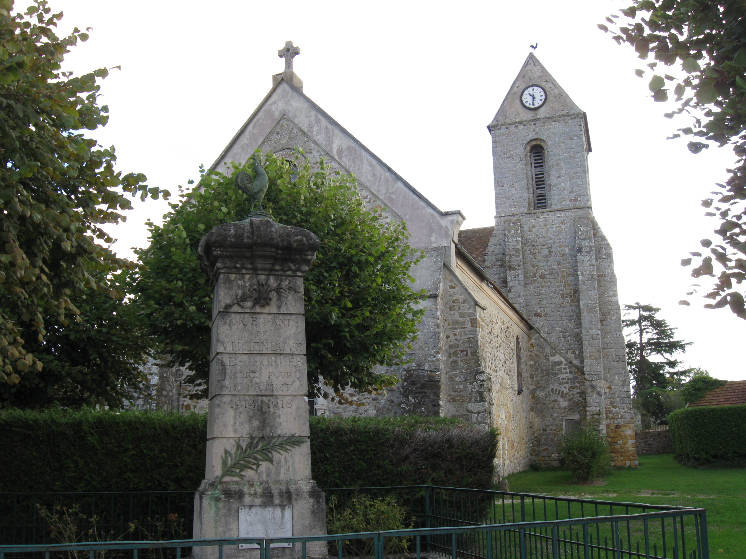 Église Notre-Dame-et-Saint-Blaise de Villeneuve-les-Bordes. (Seine-et-Marne, région Île-de-France).